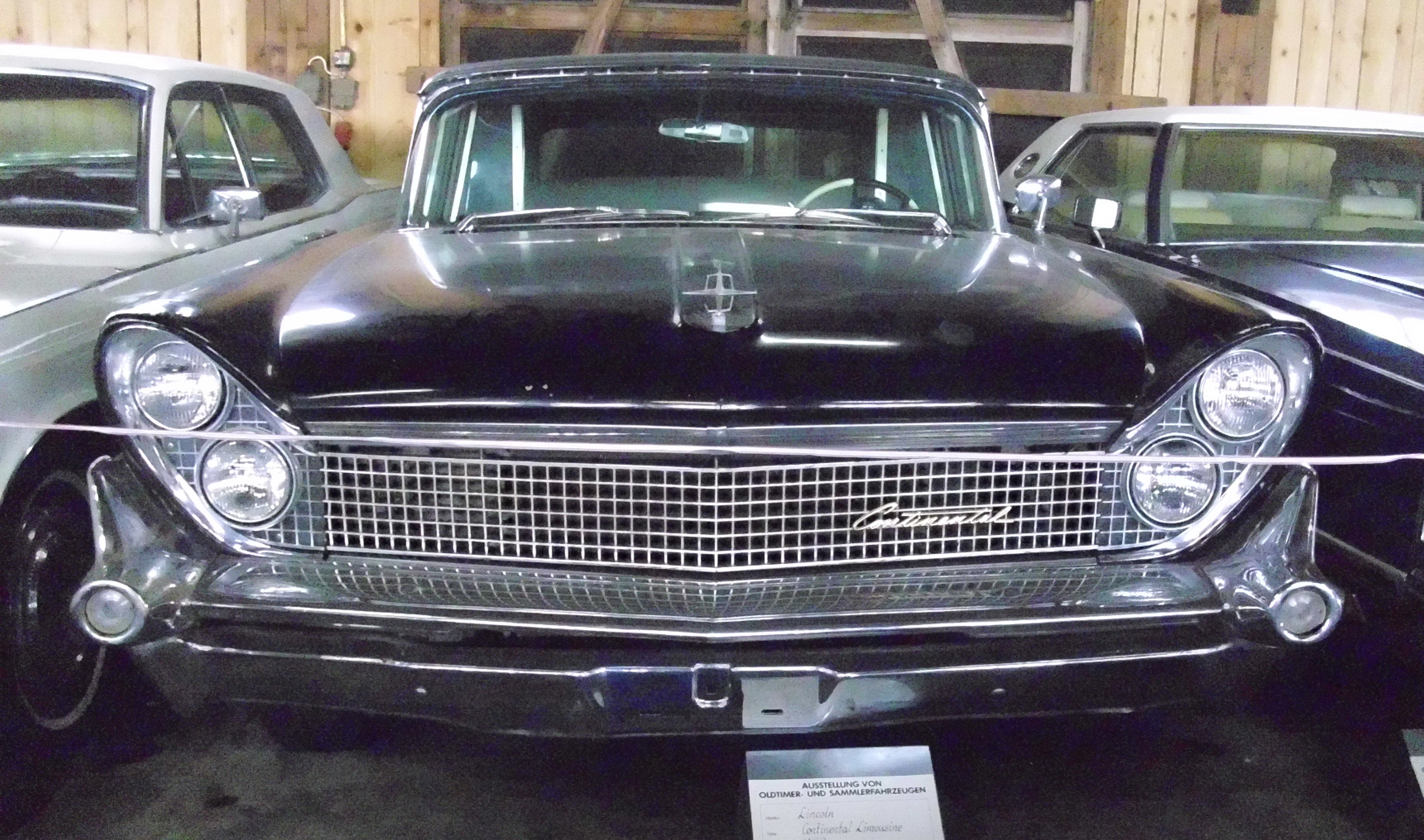 Continental Mark IV 1959 im Kraftfahrzeugmuseum Sigmundsherberg